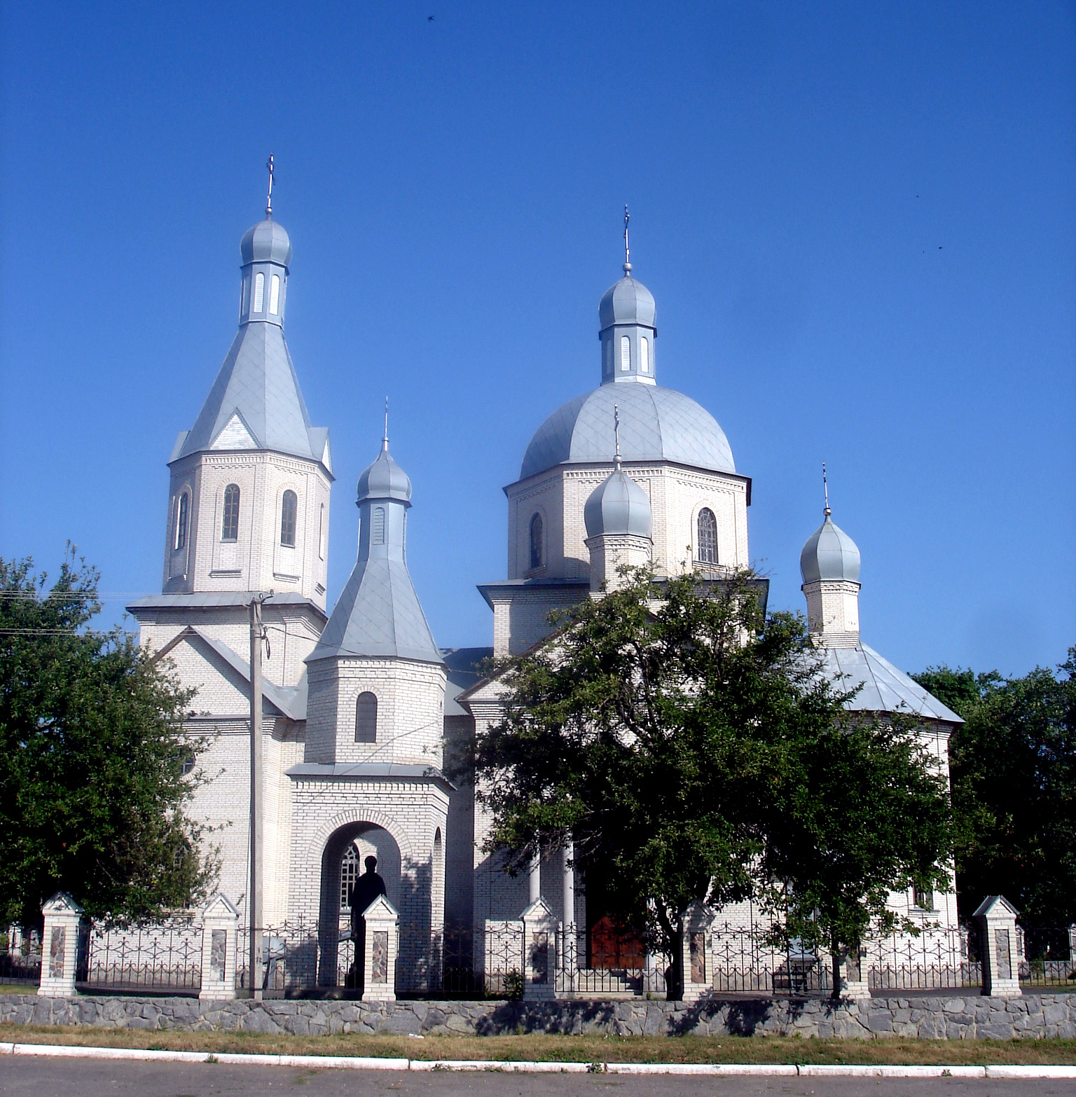 Церква Різдва Христового УПЦ МП у м. Зіньків